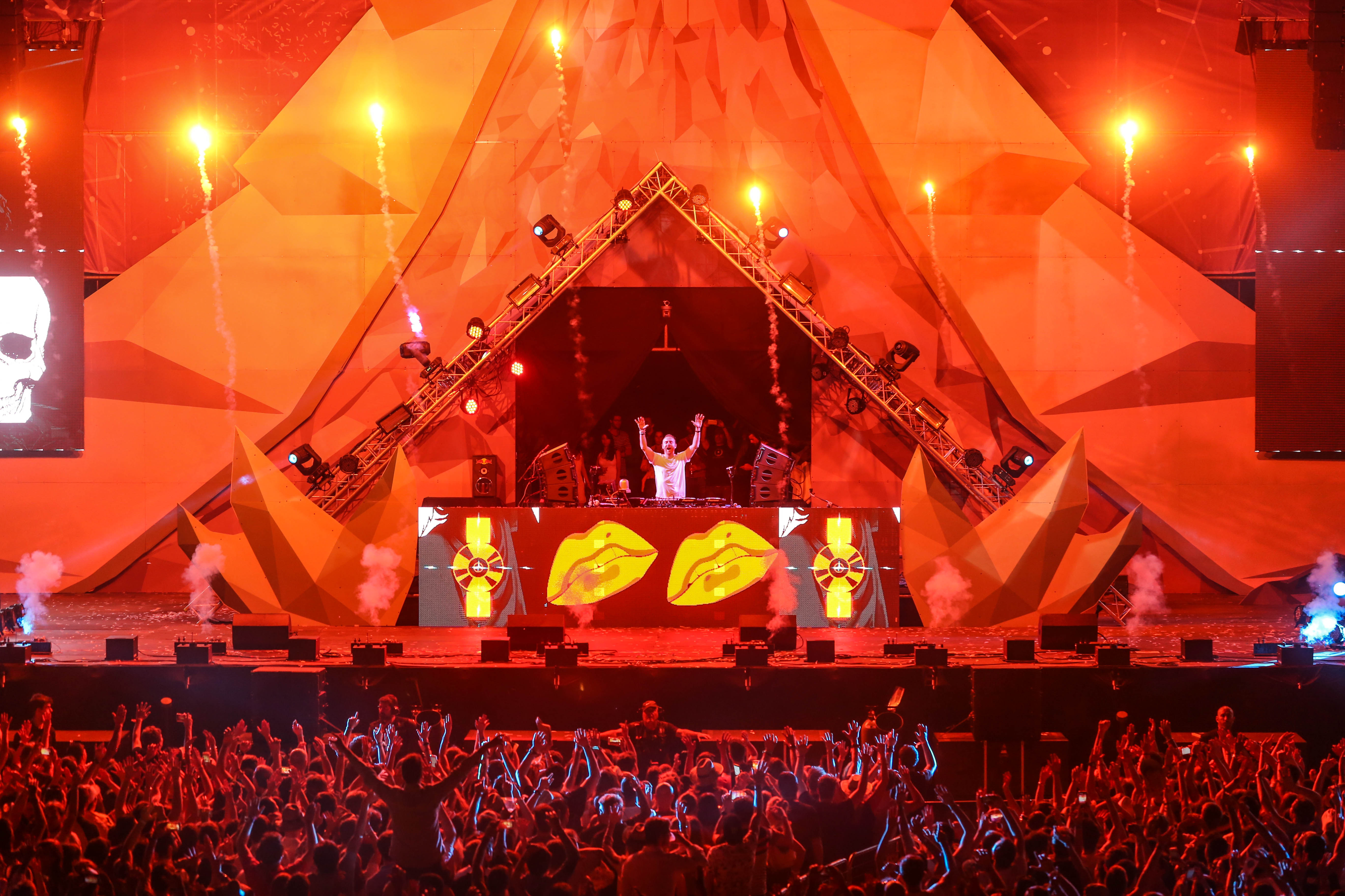 Utopía Festival 2016 (Madrid, España)